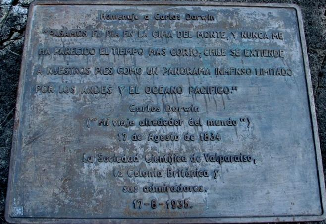 Placa conmemorativa del ascenso al cerro La Campana (Olmué, V Región, Chile) realizado por Charles Darwin. Fue puesta en la cima de la montaña por la Sociedad Científica de Valparaiso en 1935.